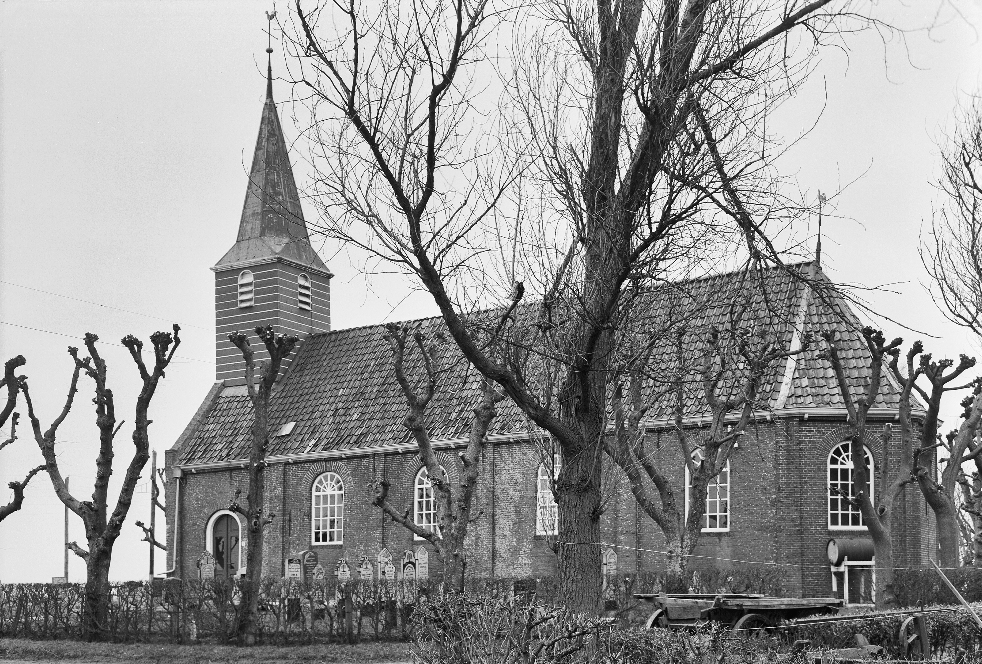 Nederlands Hervormde Kerk: zuid-zijde